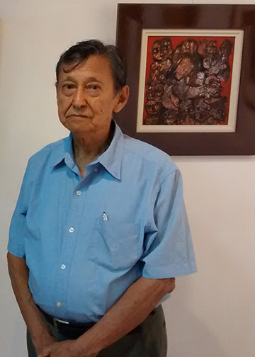 Foto Félix Aráuz